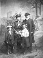 Николай Павлович Аловерт (1847—1927) c cемьей